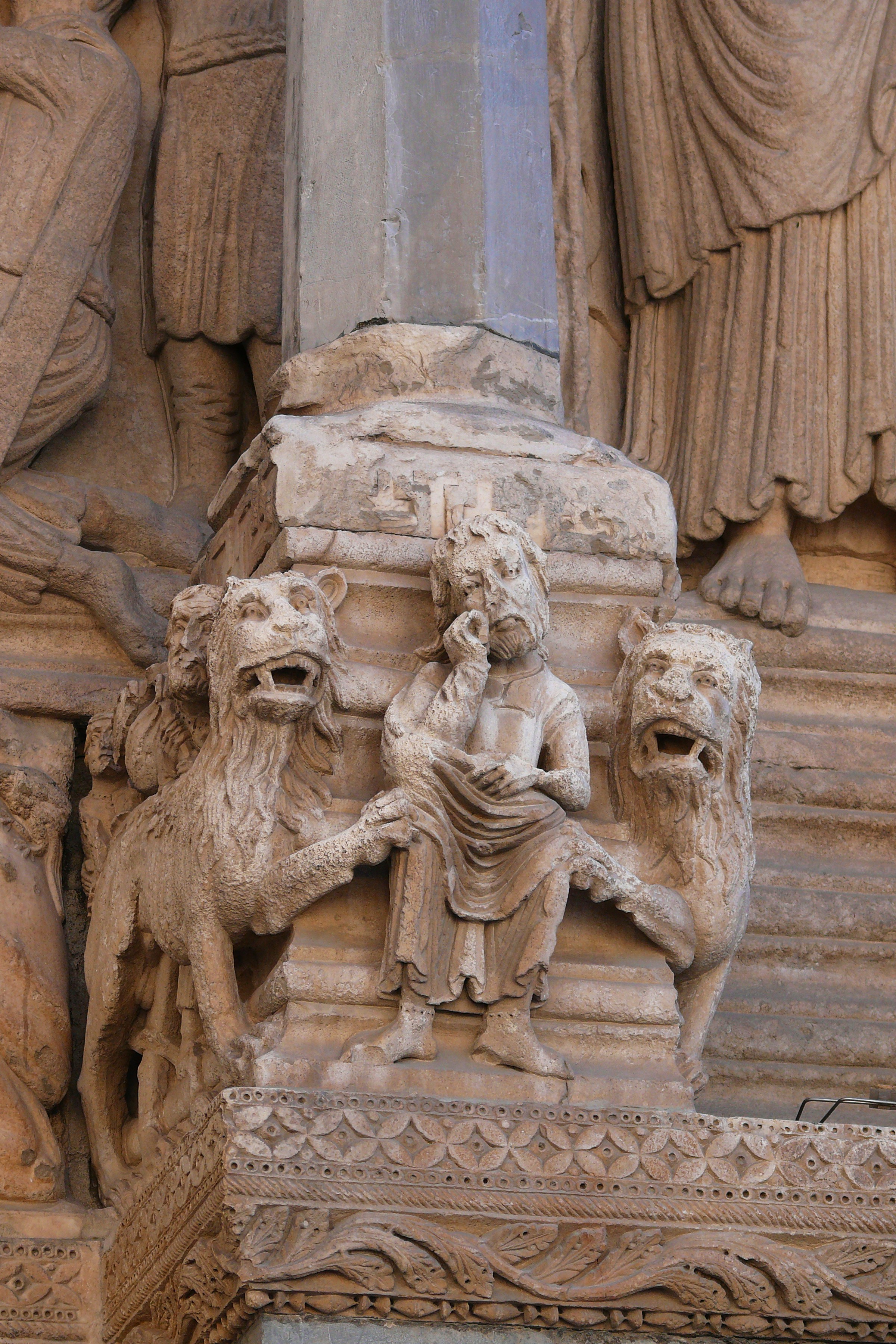 Detail aus der Portalanlage von St.Trophime in Arles (Frankreich)